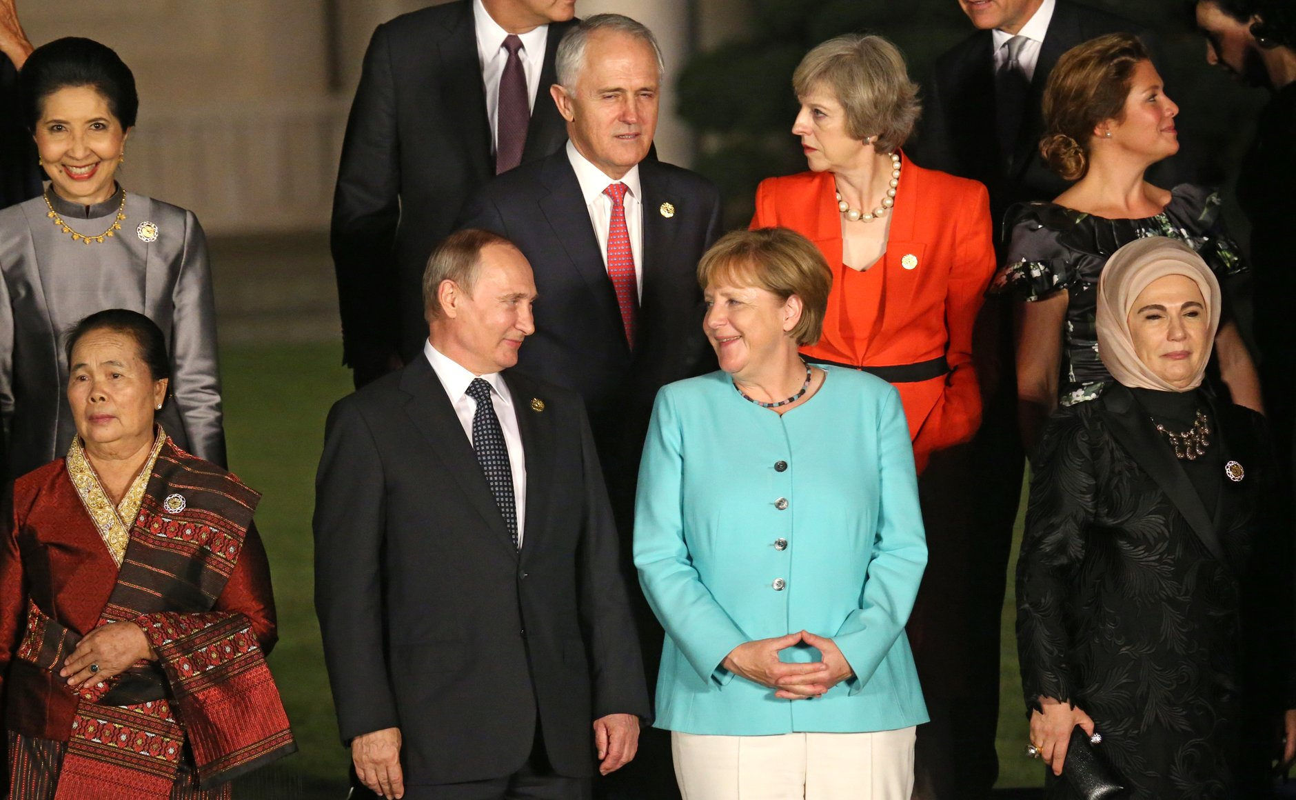 Перед началом приёма в честь глав делегаций государств – участников «Группы двадцати», приглашённых государств и международных делегаций